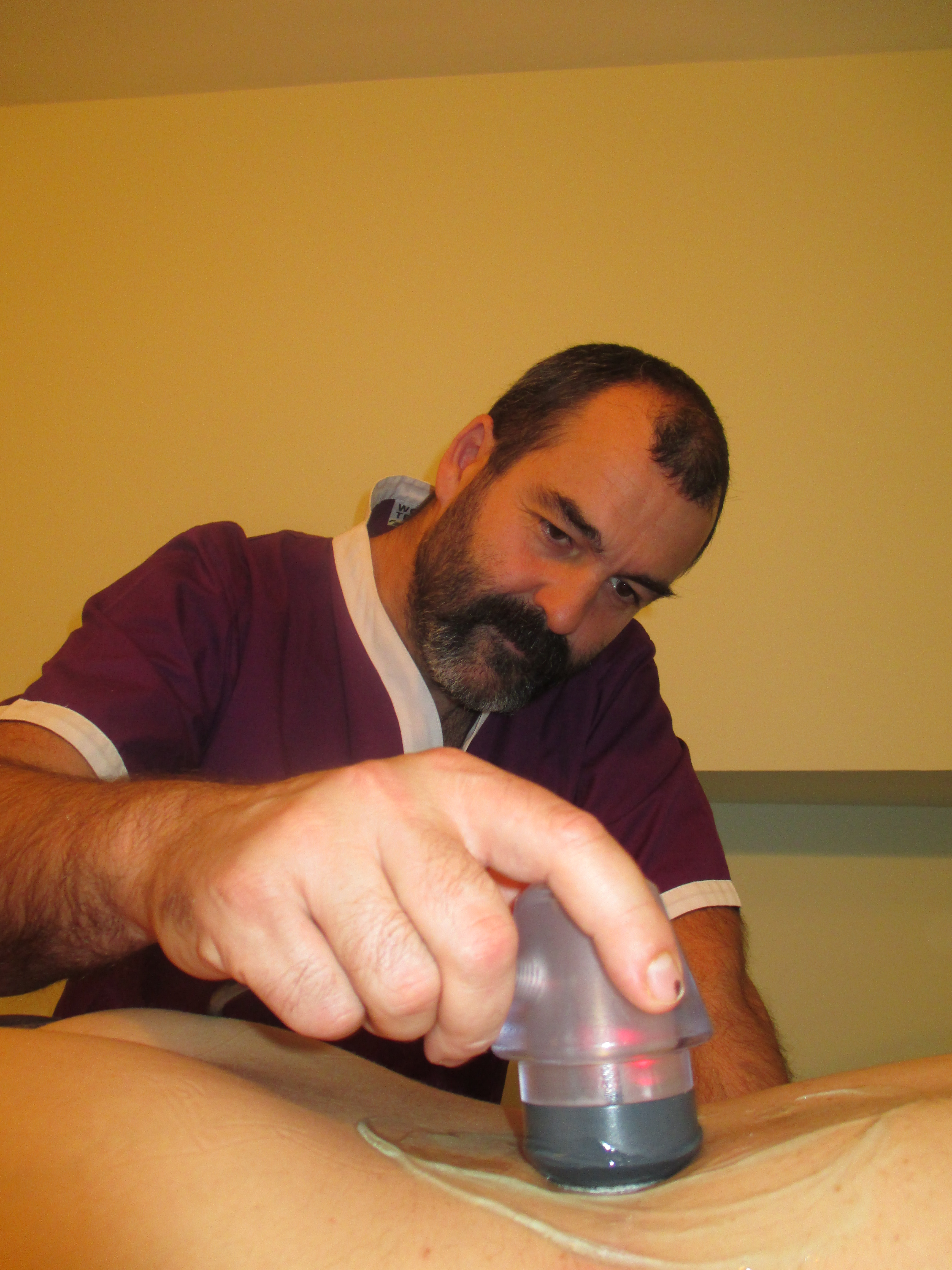 Fisioterapeuta bat ultrasoinu igorlearekin, gorputz gainean eginiko aplikazio batean.